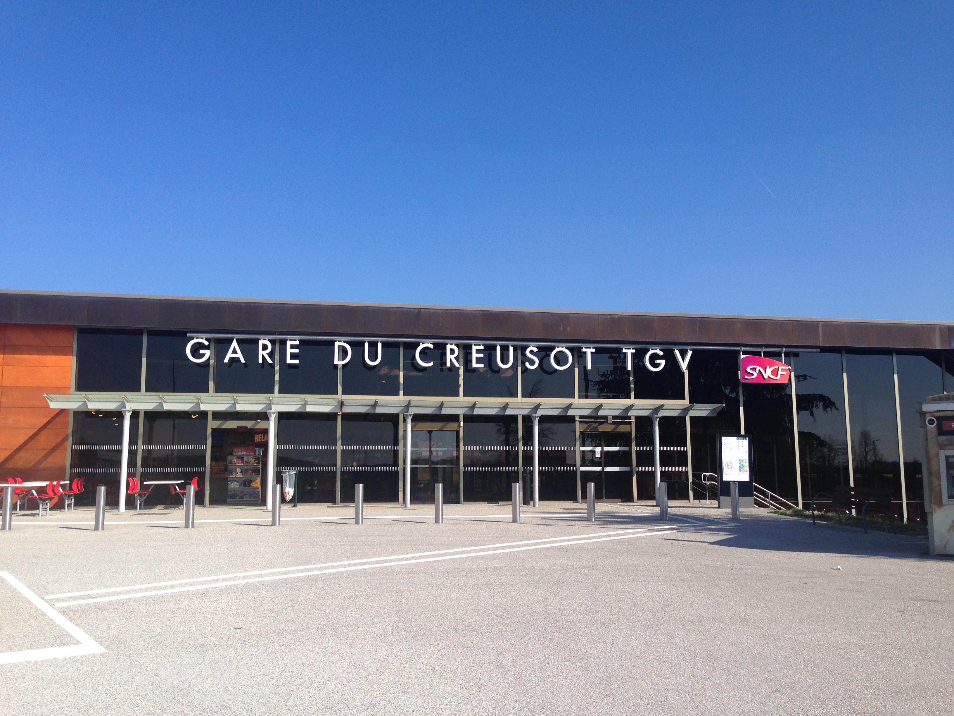 Gare du Creusot-TGV en 2017